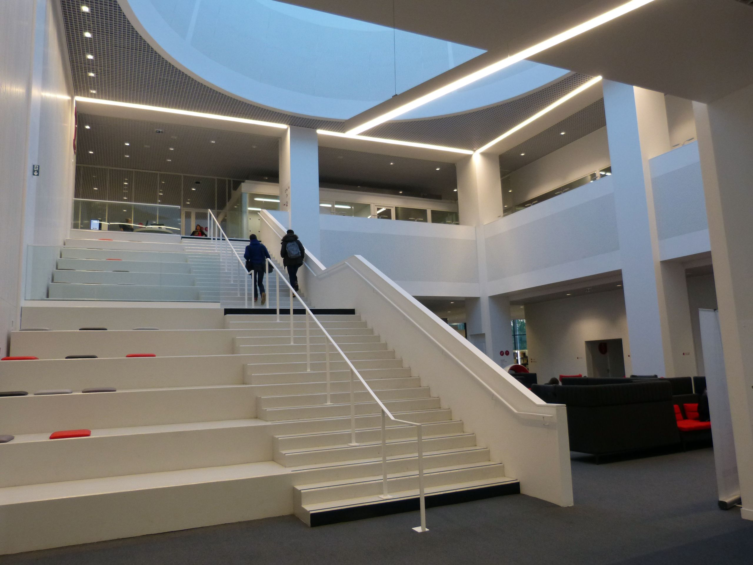 Lilliad Learning Center Innovation, Université de Lille Sciences et Technologies, Cité Scientifique, Villeneuve-D'ascq